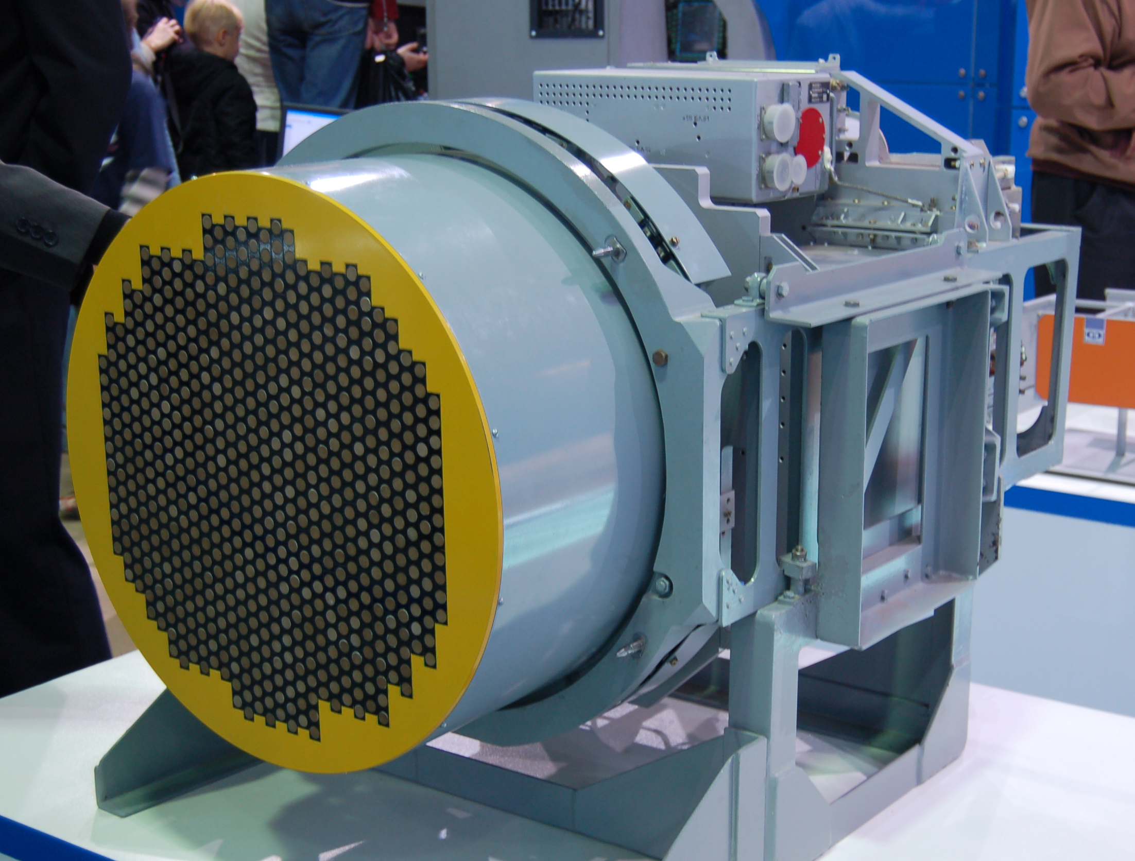 Жук-АЭ с АФАР на МАКС-2009